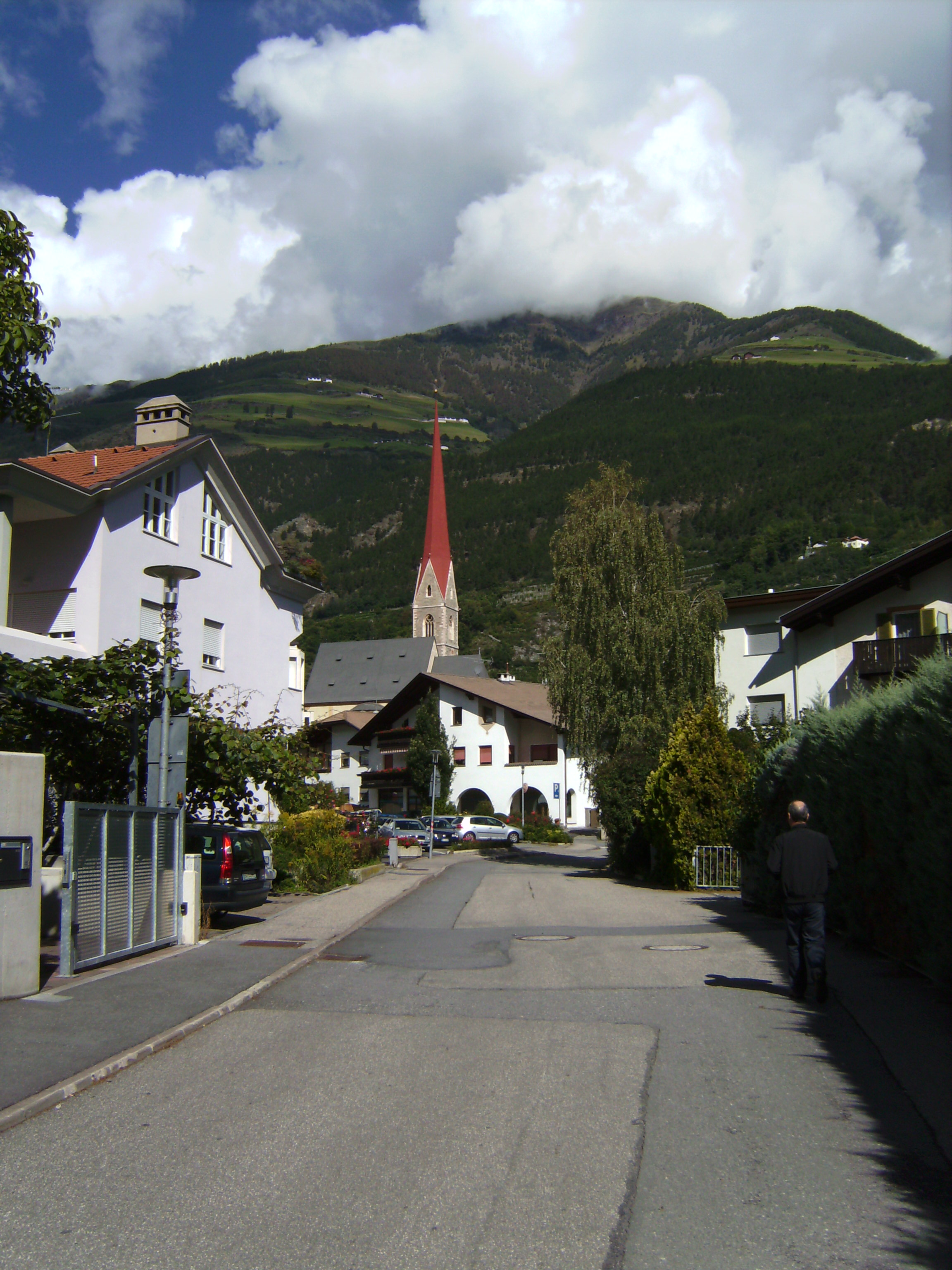 Kortscher Jöchl von Schlanders aus